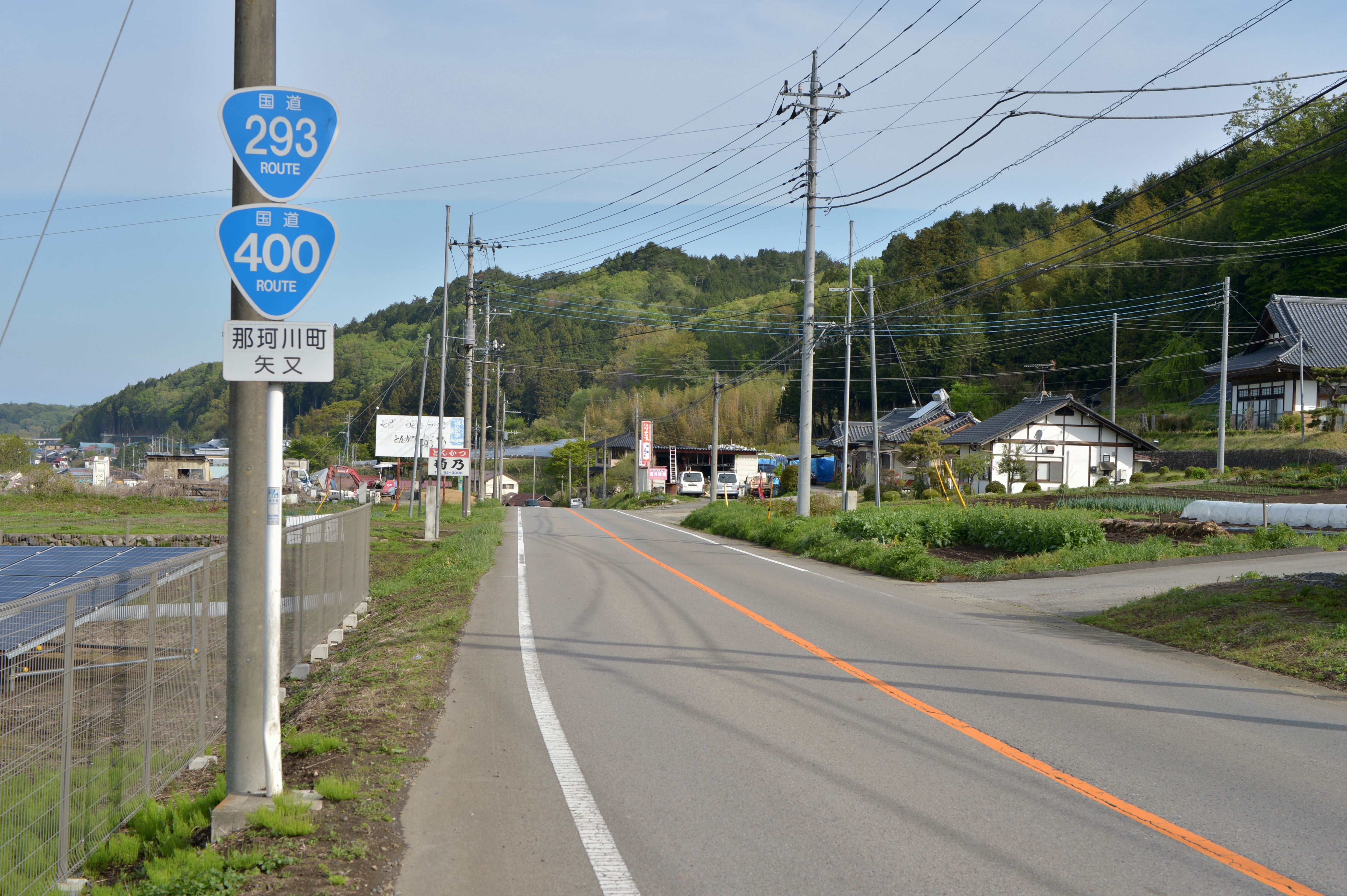 栃木県那珂川町矢又にて、国道293号・国道400号重複区間を那須塩原方面に向けて撮影。